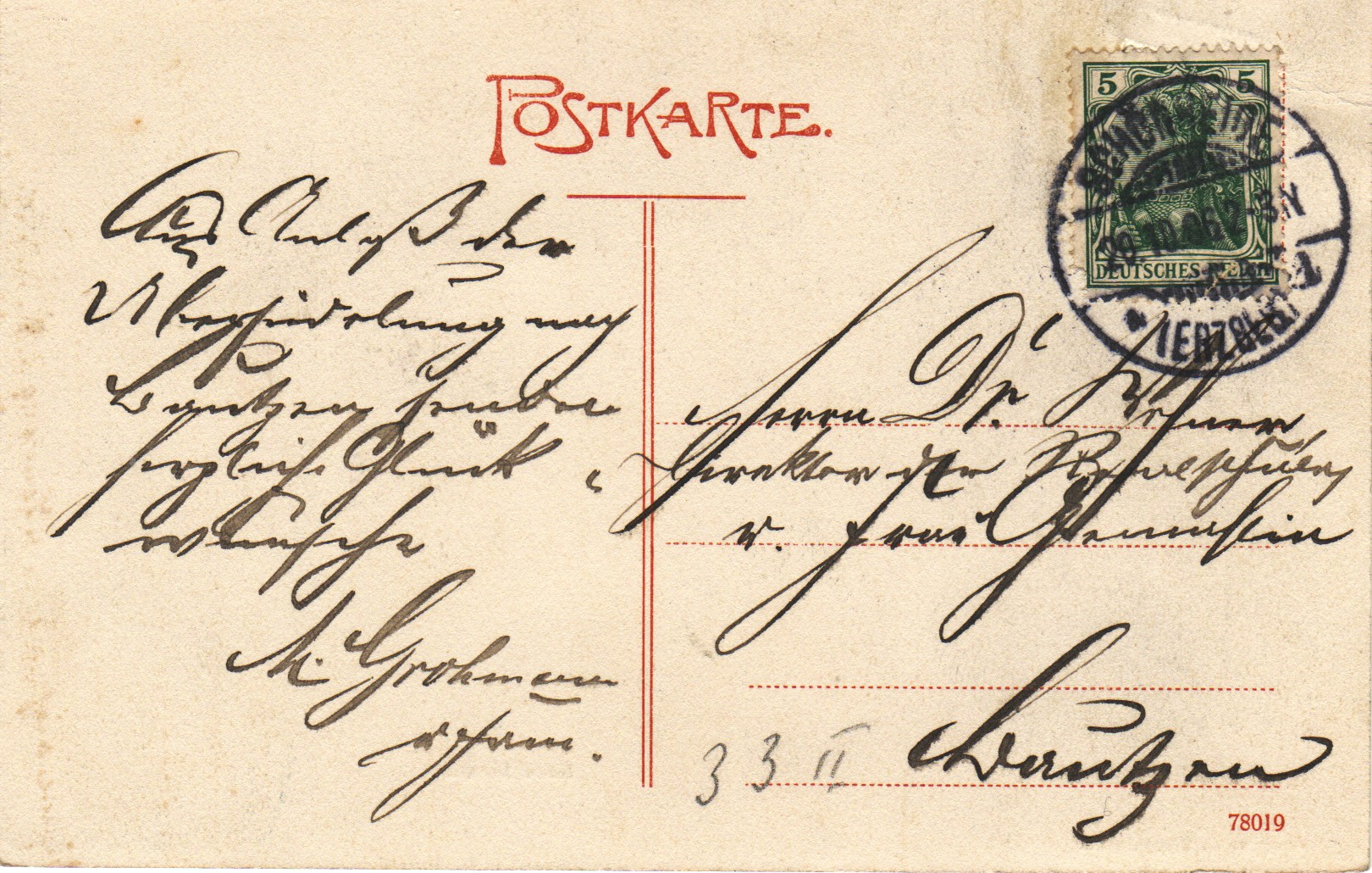 Max Grohmann gratuliert auf einer am 28. Oktober 1906 in Schönheide im Erzgebirge abgestempleten Postkarte einem beruflich nach Bautzen übergesiedelten Ehepaar.